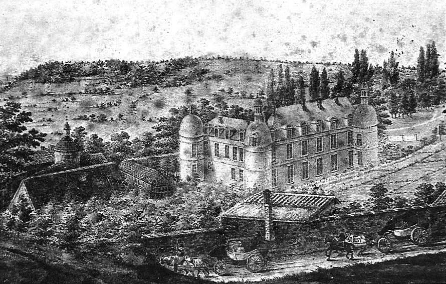 Le château d'Etoges en 1824.